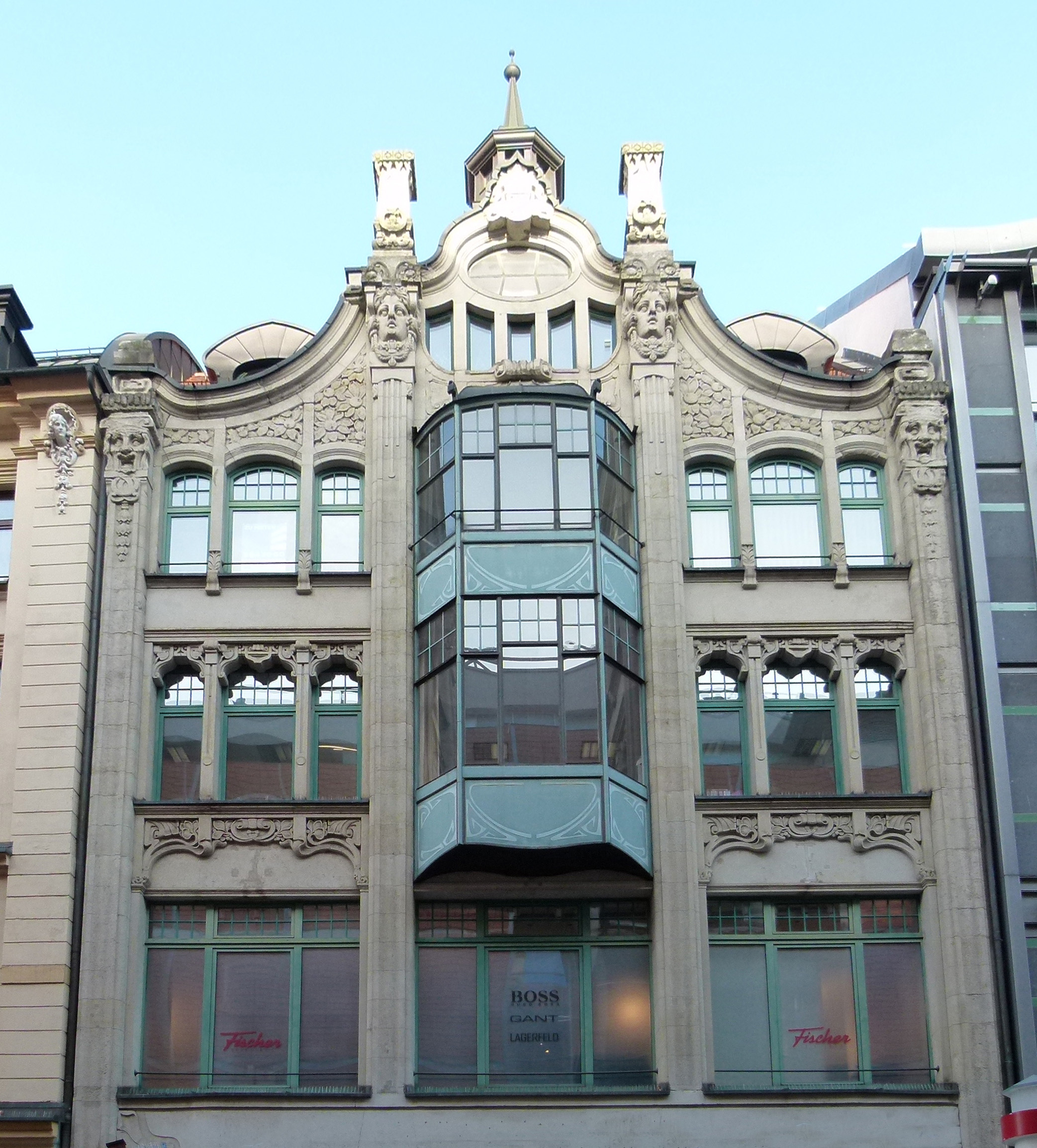 Denkmalgeschütztes Geschäftshaus, Grimmaische Straße 9-11, Leipzig (dem benachbarten Reichshof angegliedert)